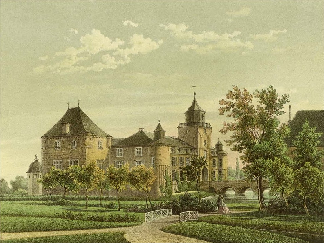 Schloss Kellenberg, Kreis Jülich